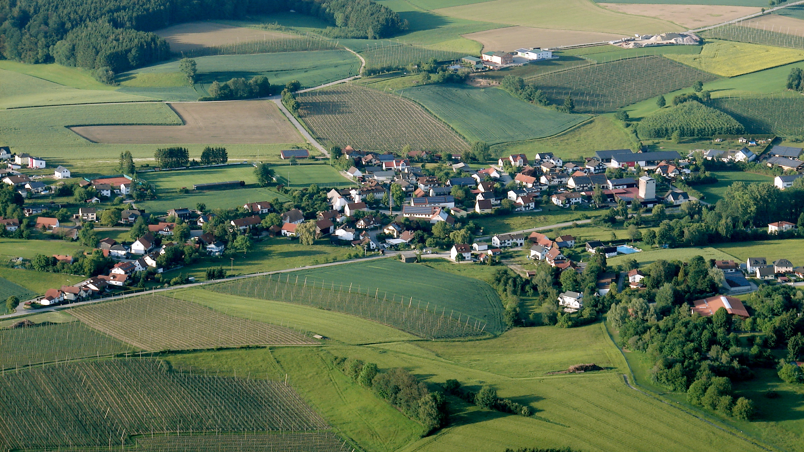 Leibersdorf ist ein Ortsteil der Gemeinde Volkenschwand im niederbayerischen Landkreis Kelheim. Bis 1978 bildete es eine selbstständige Gemeinde.